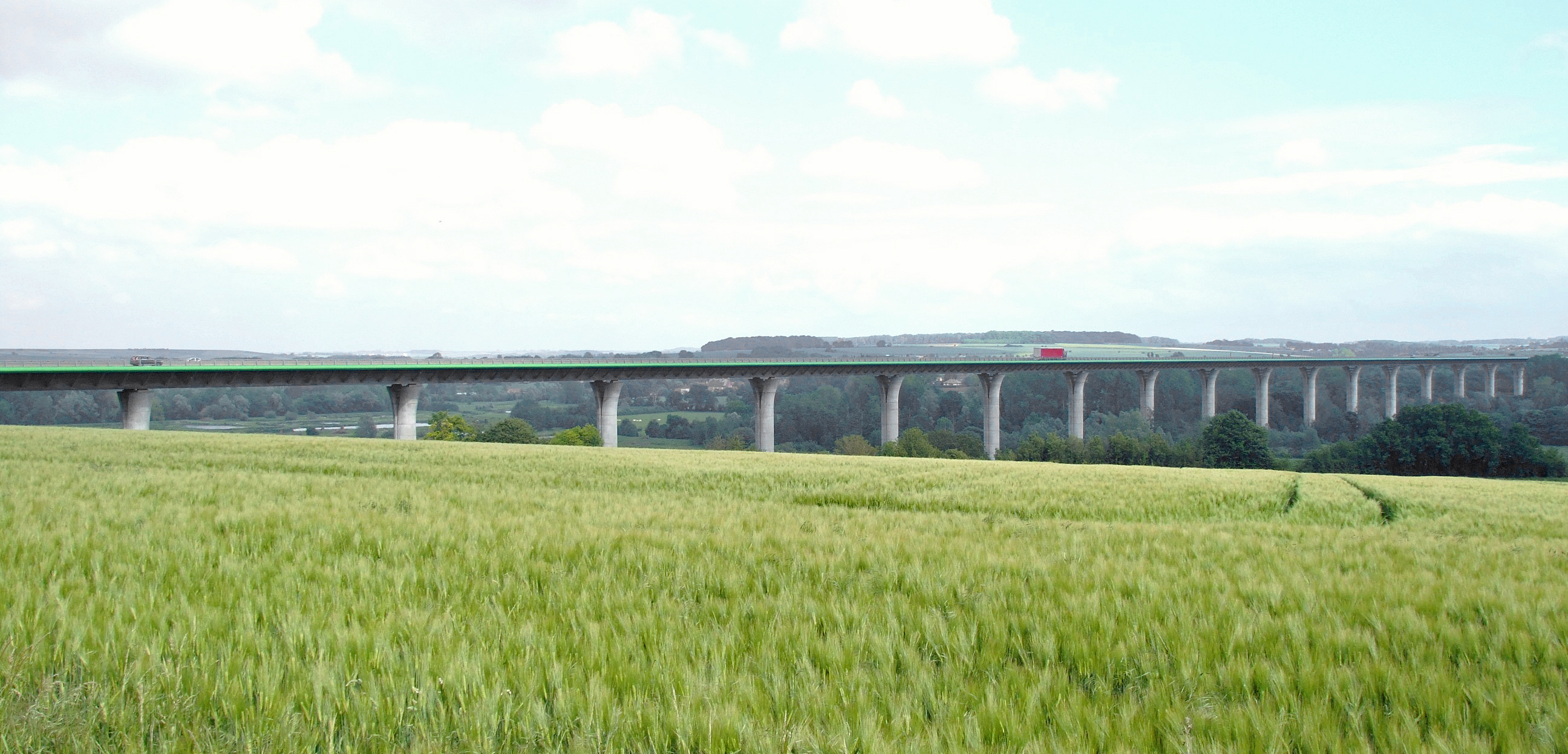 A16 - Viaduc du Scardon, à proximité d'Abbeville, Somme, Fr.